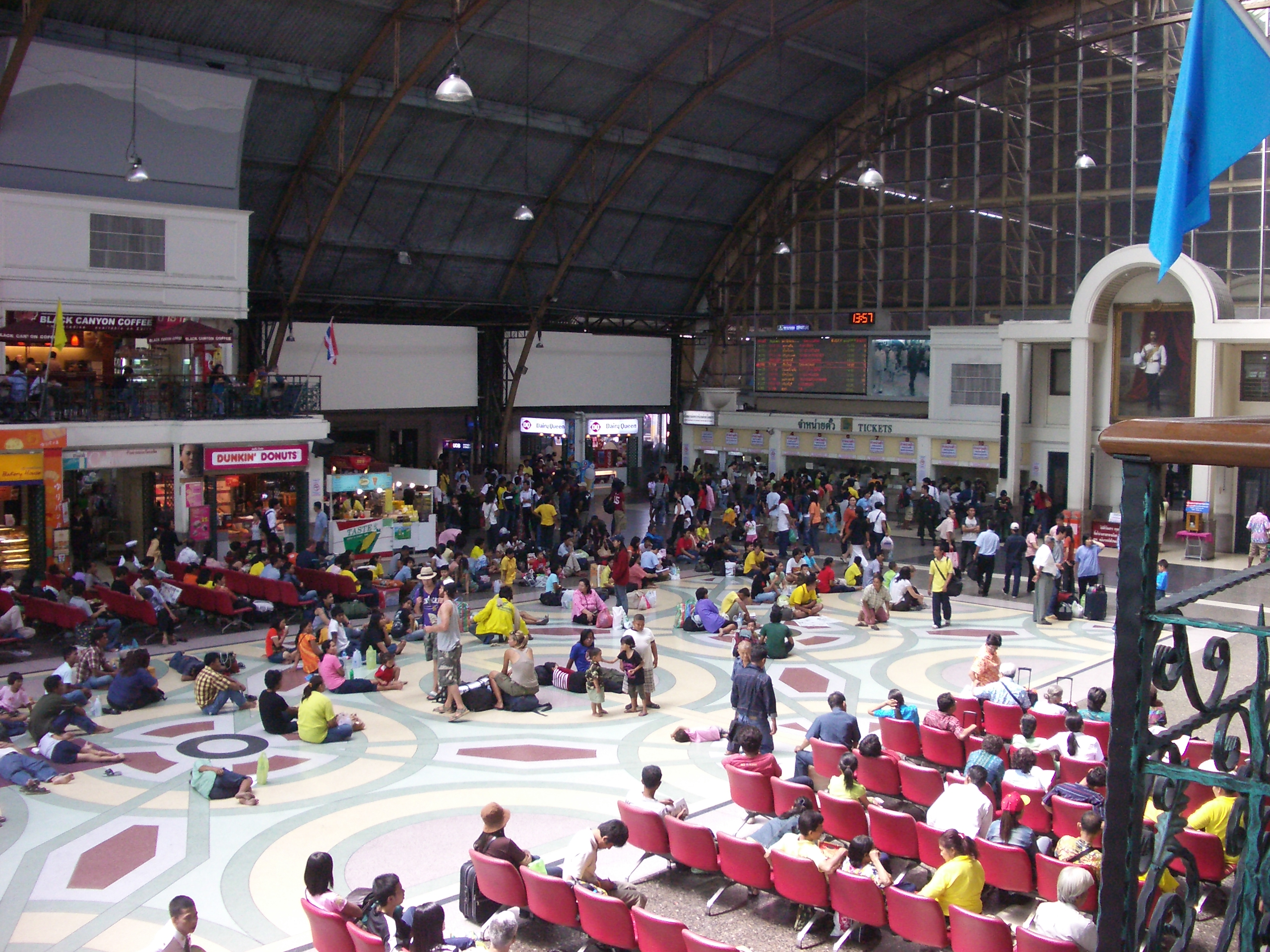 Hualomphong intérieur gare Bangkok Thailande Octobre 2006 2007-04-12 (original upload date) Photographie prise en octobre 2006 par Funad